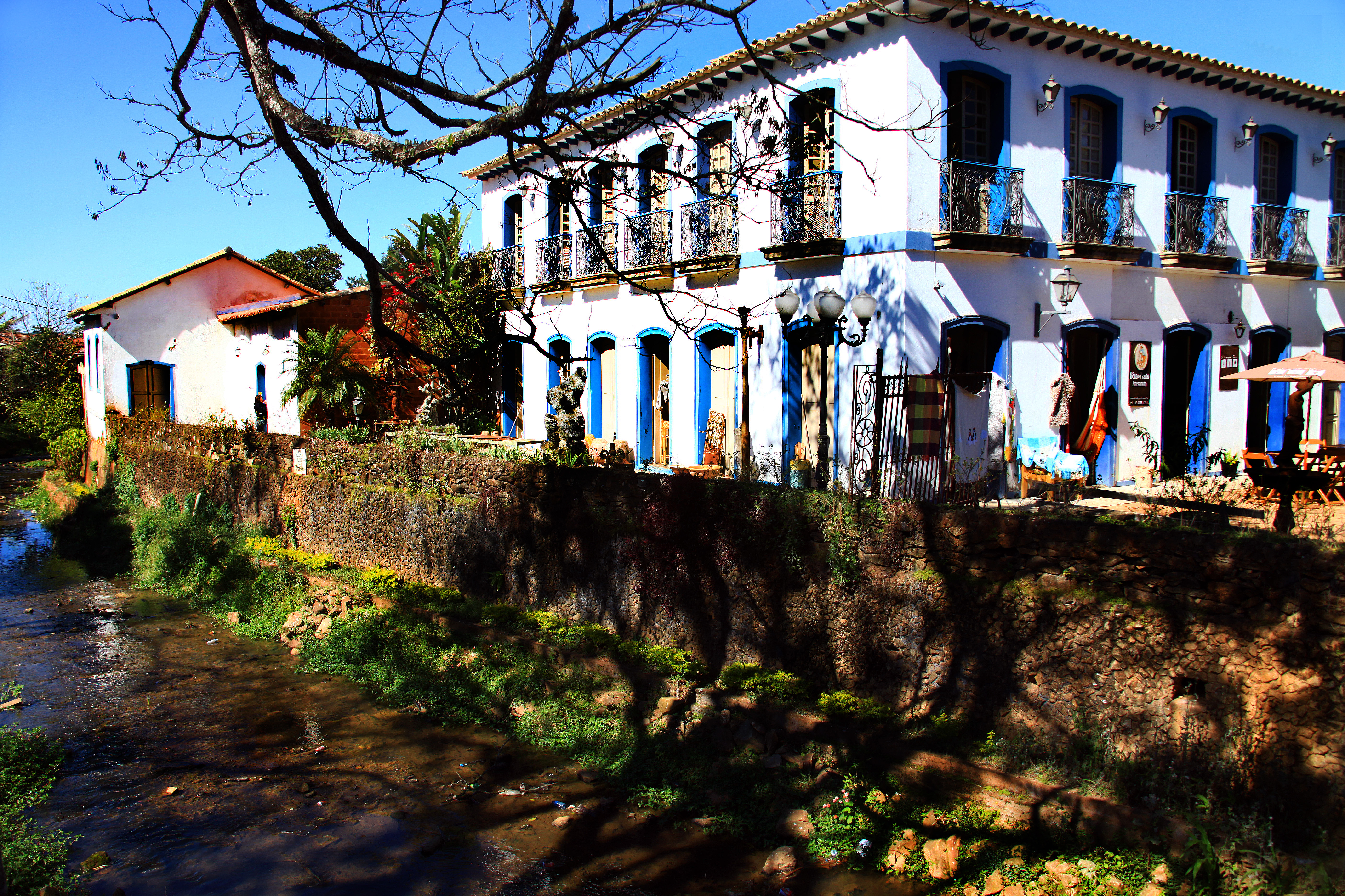 Ao visitar Tiradentes, é possível perceber a forte relação da história da cidade com os acontecimentos políticos e econômicos do Brasil em seus anos de Colônia, Império e República. Fundada em 1702 por bandeirantes paulistas que descobriram ouro nas encostas da Serra de São José, Tiradentes, na época um pequeno vilarejo, já recebeu o nome de “Arraial Velho de Santo Antônio”, “Vila de São José do Rio das Mortes” e “Santo Antônio do Rio das Mortes”.